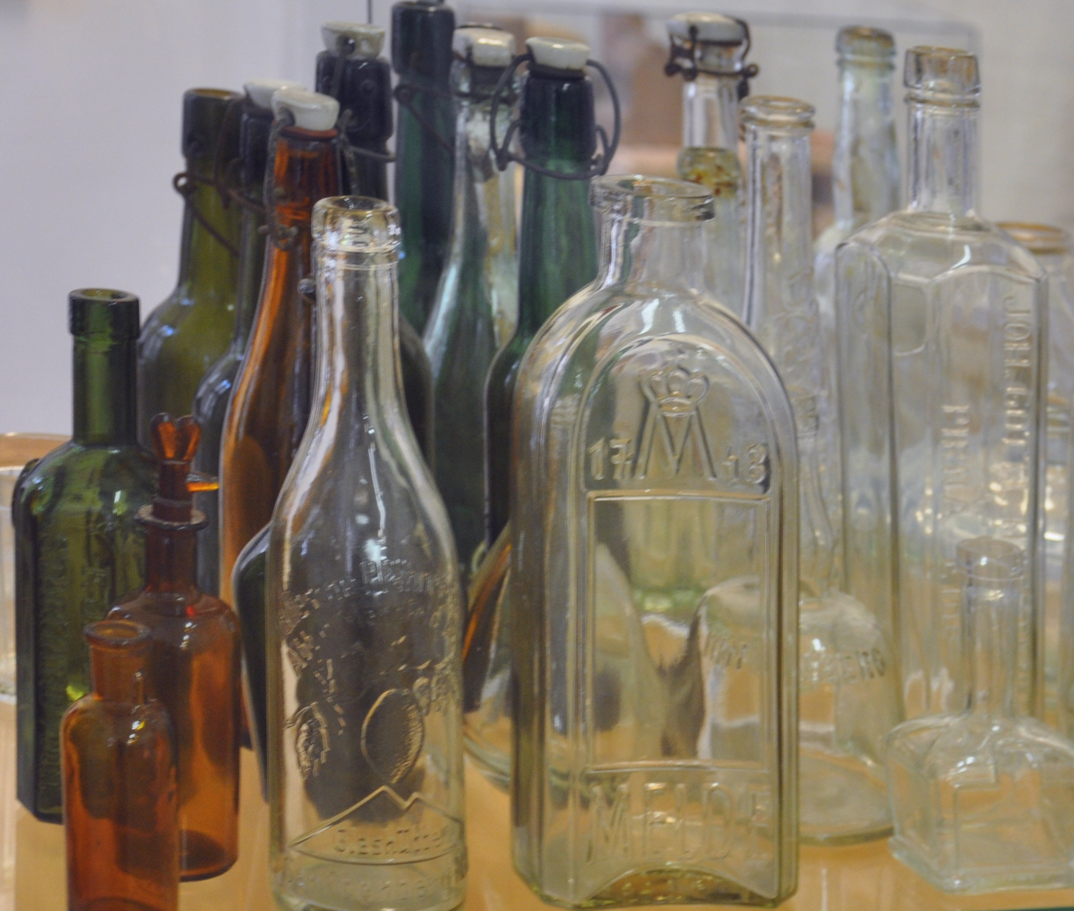 Museum Senftenberg (im Schloss Senftenberg), Industrieabteilung Glasflaschen, 1. Hälfte des 20. Jh., hergestellt in Senftenberg, Großräschen, Annahütte, Hosena, Friedrichsthal